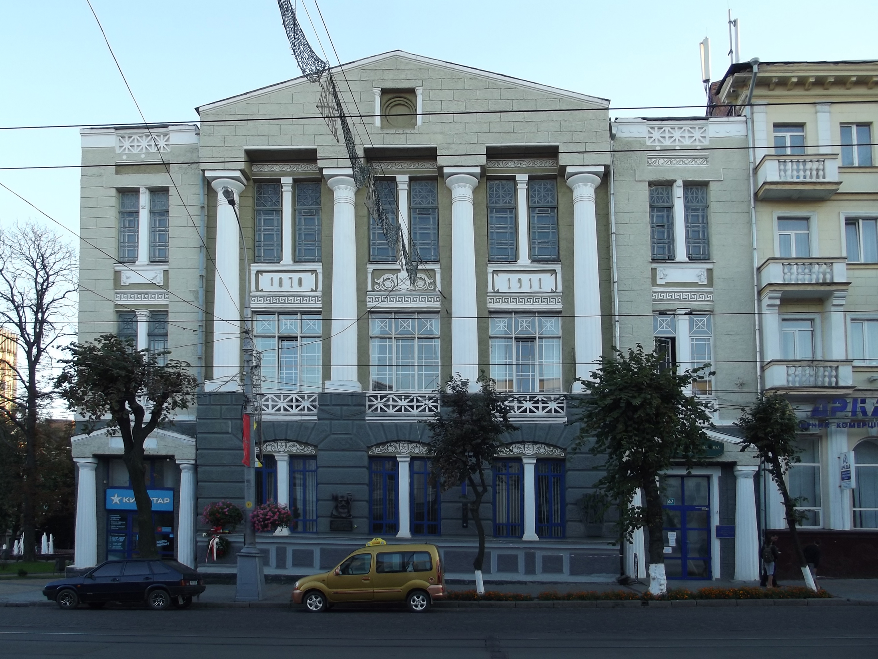 Здание на улице Соборной, 76. Архитектор Григорий Артынов